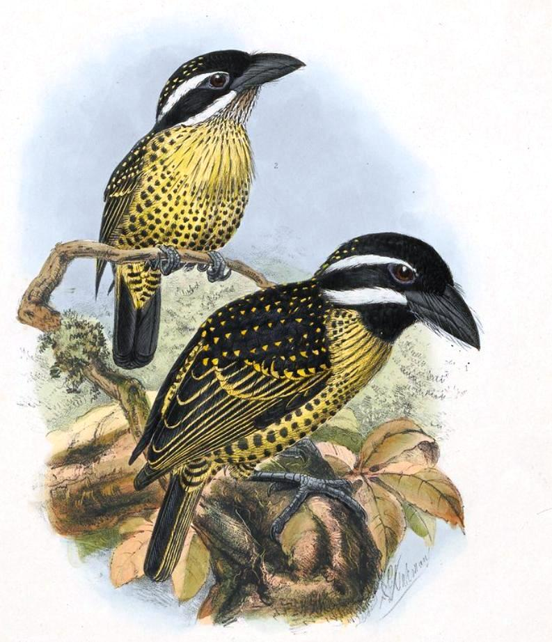 Pogonorhynchus hirsutus